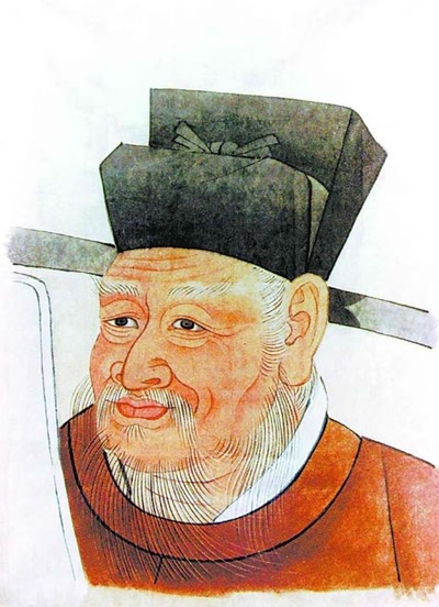 包拯画像